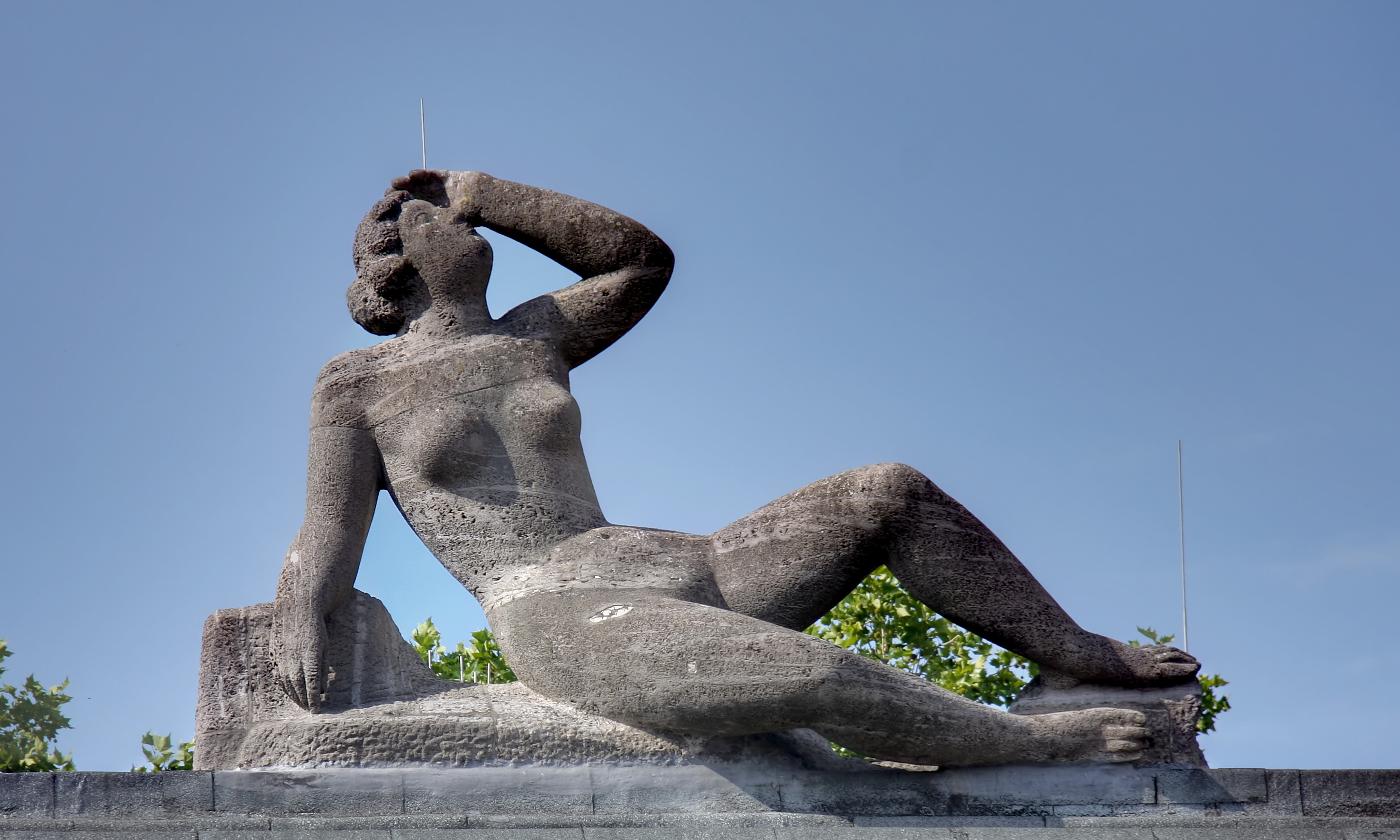 Aurora